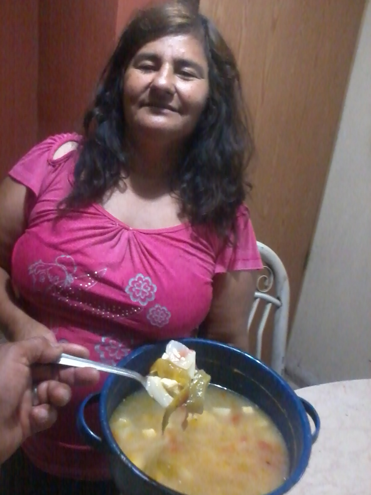 sabroso caldo de queso con chile verde estilo Sonora.